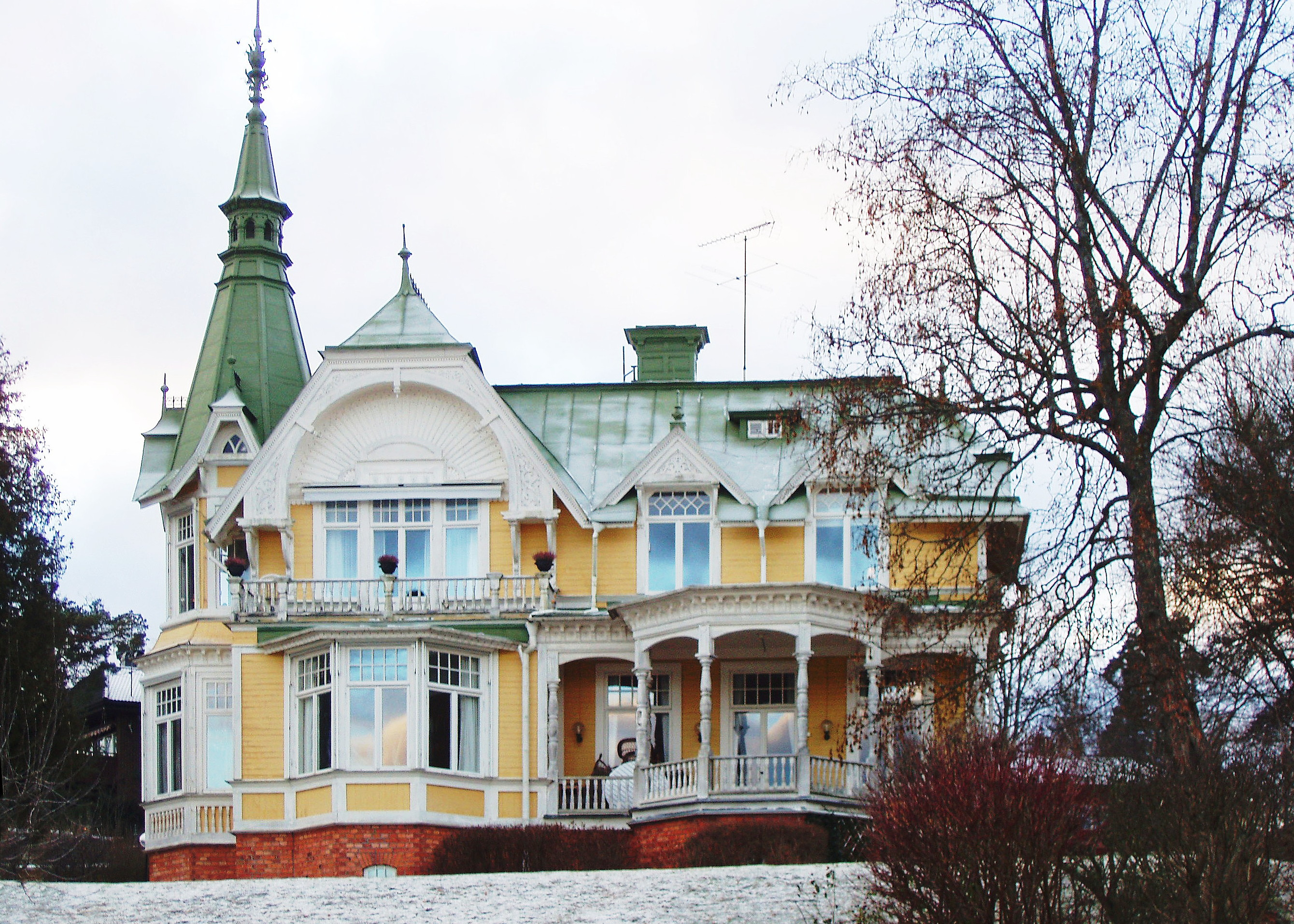 Villa Högudden, sommarvilla på Lidingö ursprungligen uppförd 1876. Ombyggd 1895 med professor Ragnar Bruzelius som ägare och renoverad av Lidingö stad på slutet av 1960-talet. Byggnadsminnesförklarad.